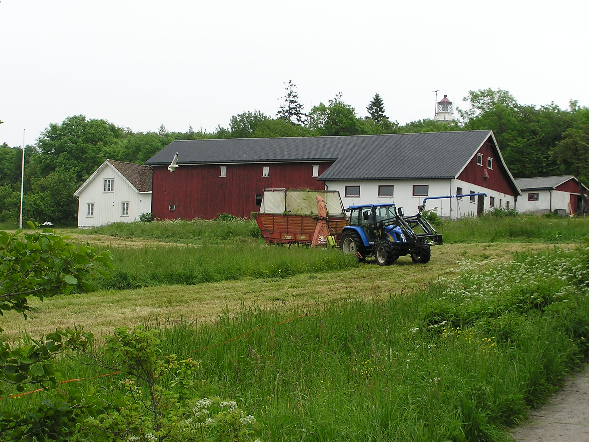 Slått med traktor og forhaustar på Jomfruland. Toppen av Jomfruland fyr til høgre over løetaket.